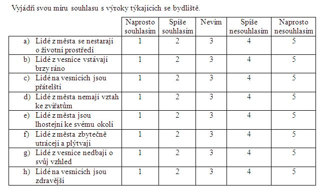 Likertova škála-ukázka z dotazníku